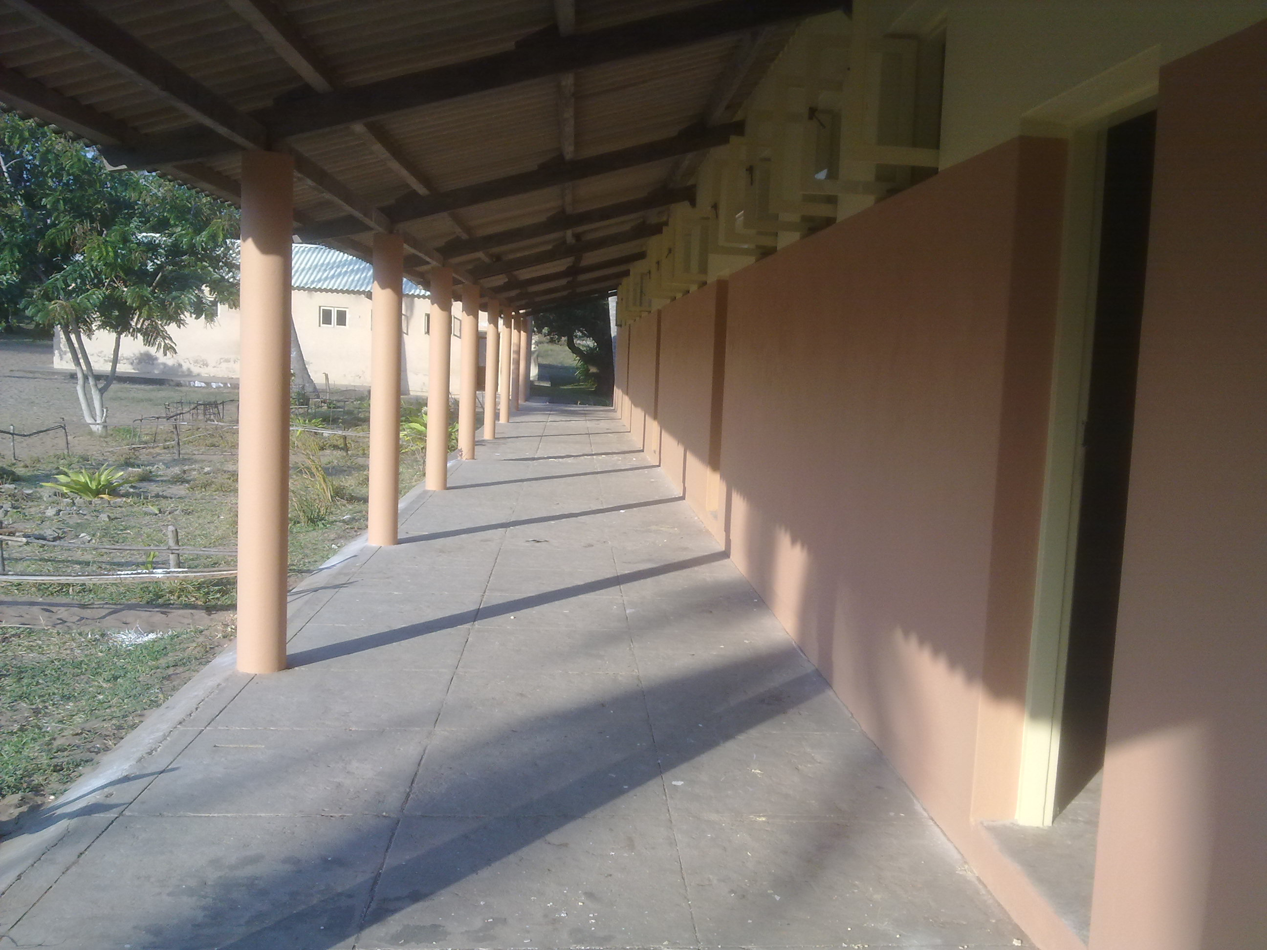 Salas Principais da Escola